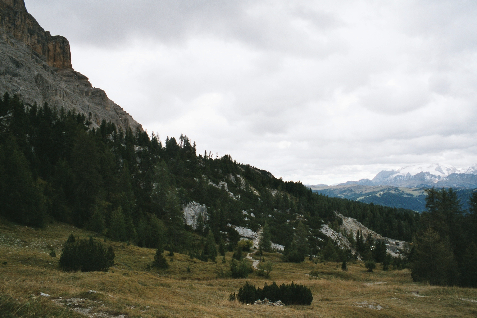 Armentara near Wengen